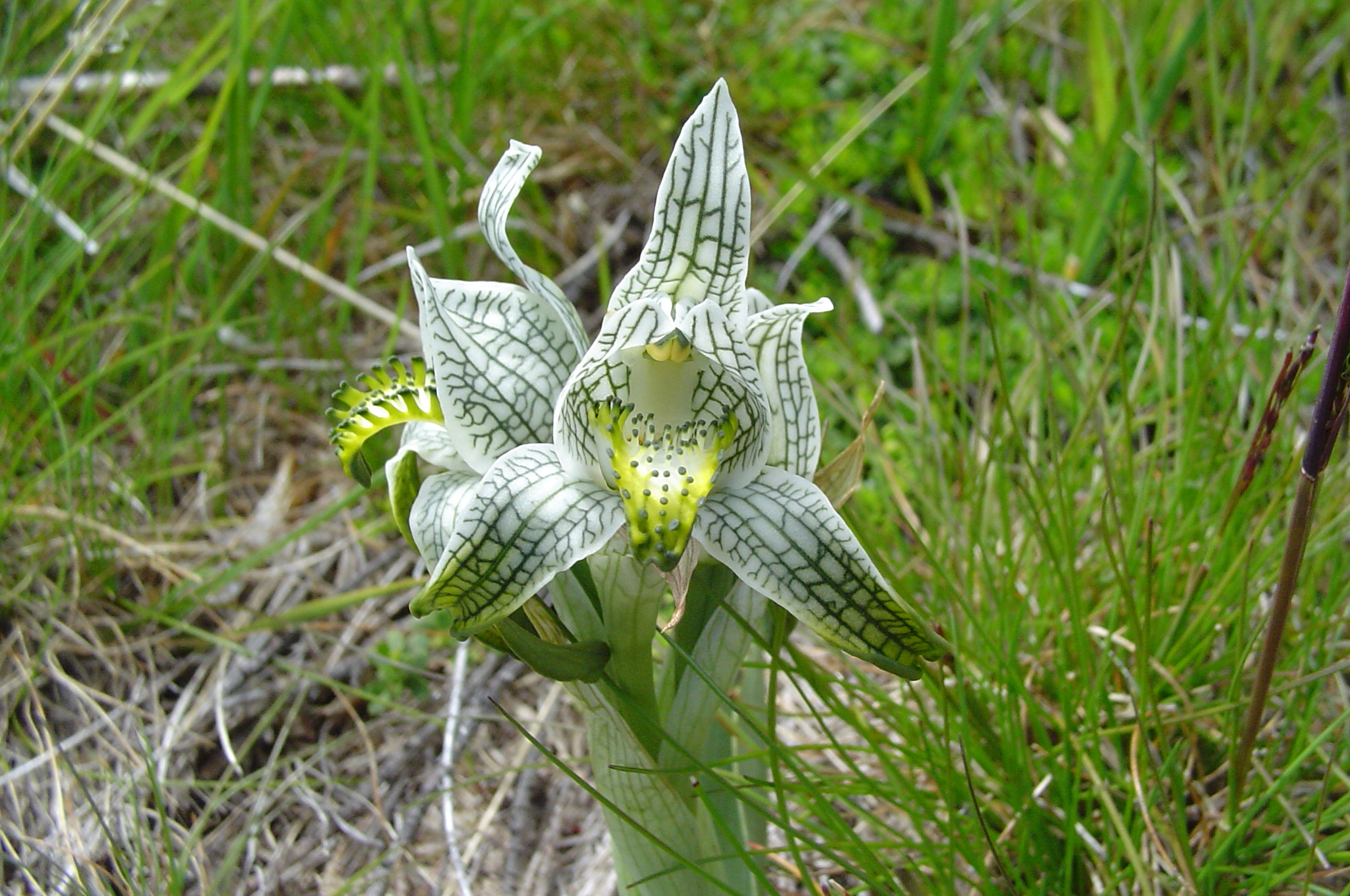 Orchidée Chloraea magellanica. Photo prise au parc Torres del Paine